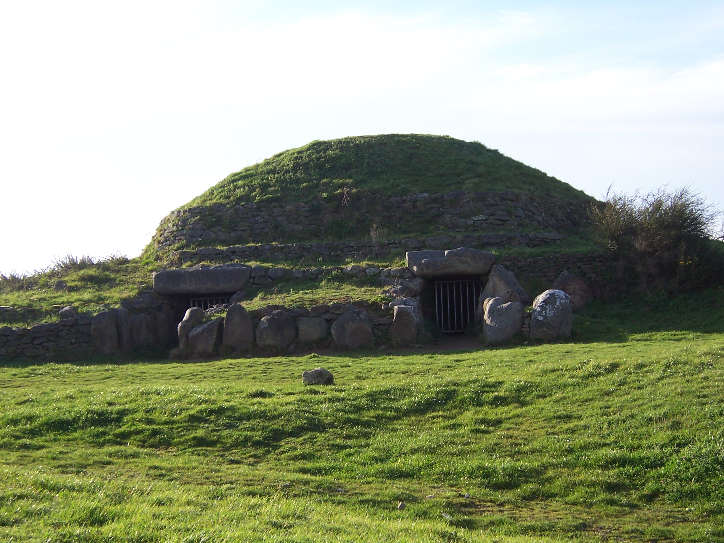 Les deux entrées du Tumulus de Dissignac, Site mégalithique de Loire-Atlantique, à Saint-Nazaire (France)